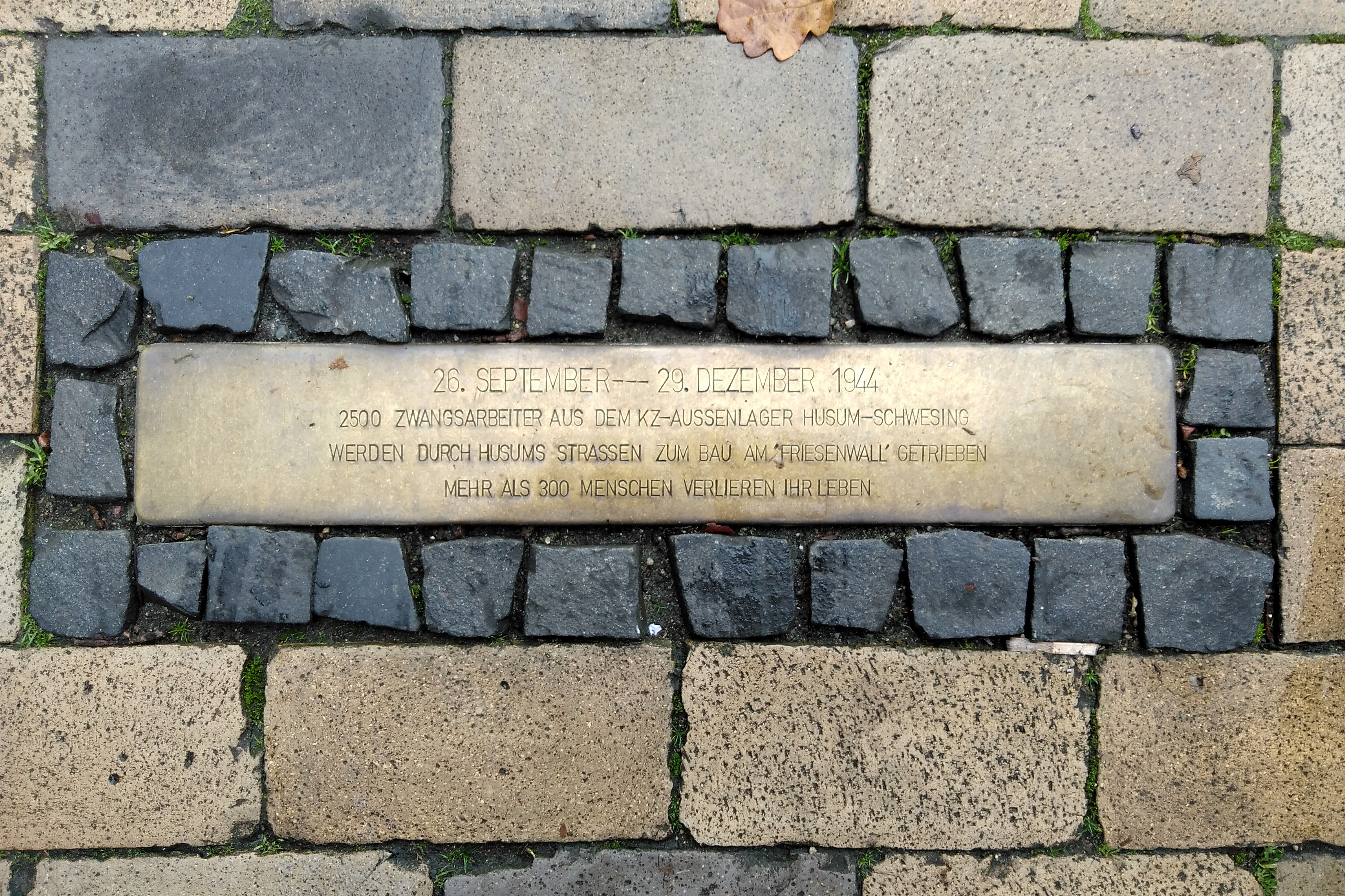 Stolperstein zum Gedenken an die Zwangsarbeiter in Husum